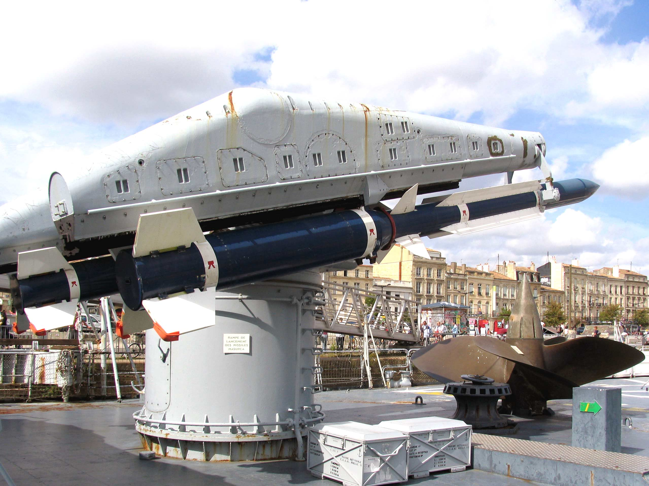 Rampe de lancement de missile anti aérien moyenne portée MASURCA sur le croiseur désaffecté COLBERT Place : Croiseur Colbert, Bordeaux, France Date : Septembre 2004 Auteur : Pline Photo personnelle